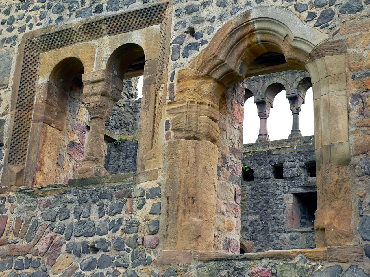 Staufische Fenster der Burg Münzenberg in Hessen, Germany